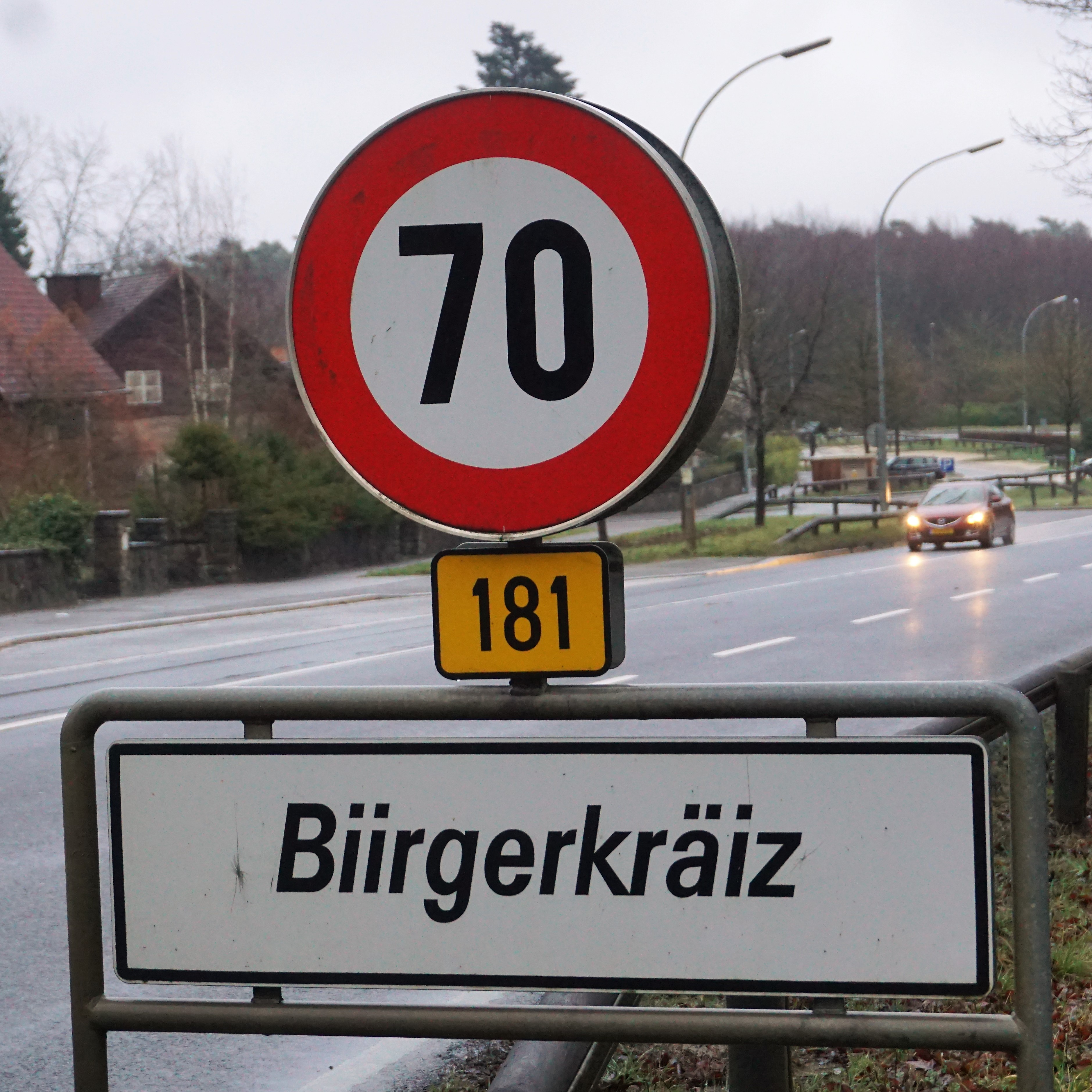 Panneau de localisation du lieu-dit "Biirgerkräiz" (orthographe ioncorrecte). Commune de Kopstal.